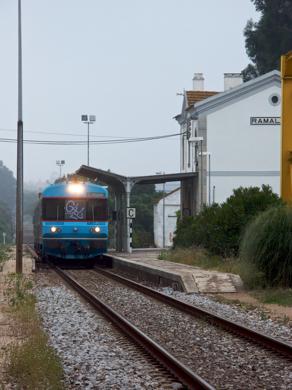 Tipo: Comboio InterRegional 809 [Entrecampos • Poente - Caldas da Rainha] Local: Estação do Ramalhal [Linha do Oeste, PK 71] Data e hora: 15 de Junho de 2008 [17h44] Material: Automotora 04xx [Unidade Dupla Diesel]